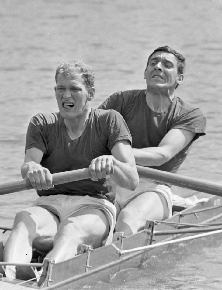 Roeien Bosbaan regatta. Twee met stuurman gewonnen door Van Nes (l) en Susselbeek in aktie